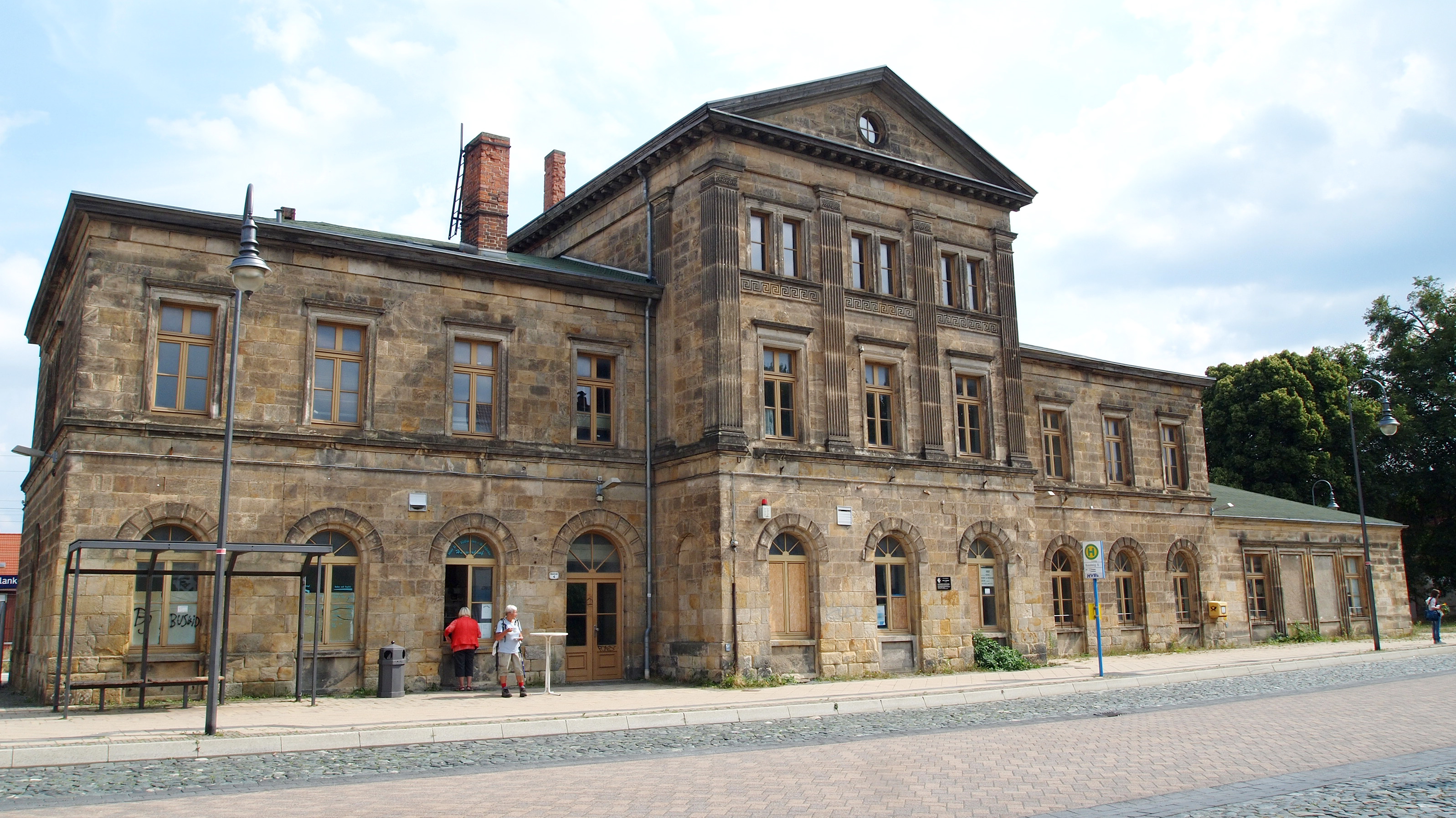 Blankenburg, Landkreis Harz, Sachsen-Anhalt; Bahnhofsgebäude (wird nicht mehr genutzt)